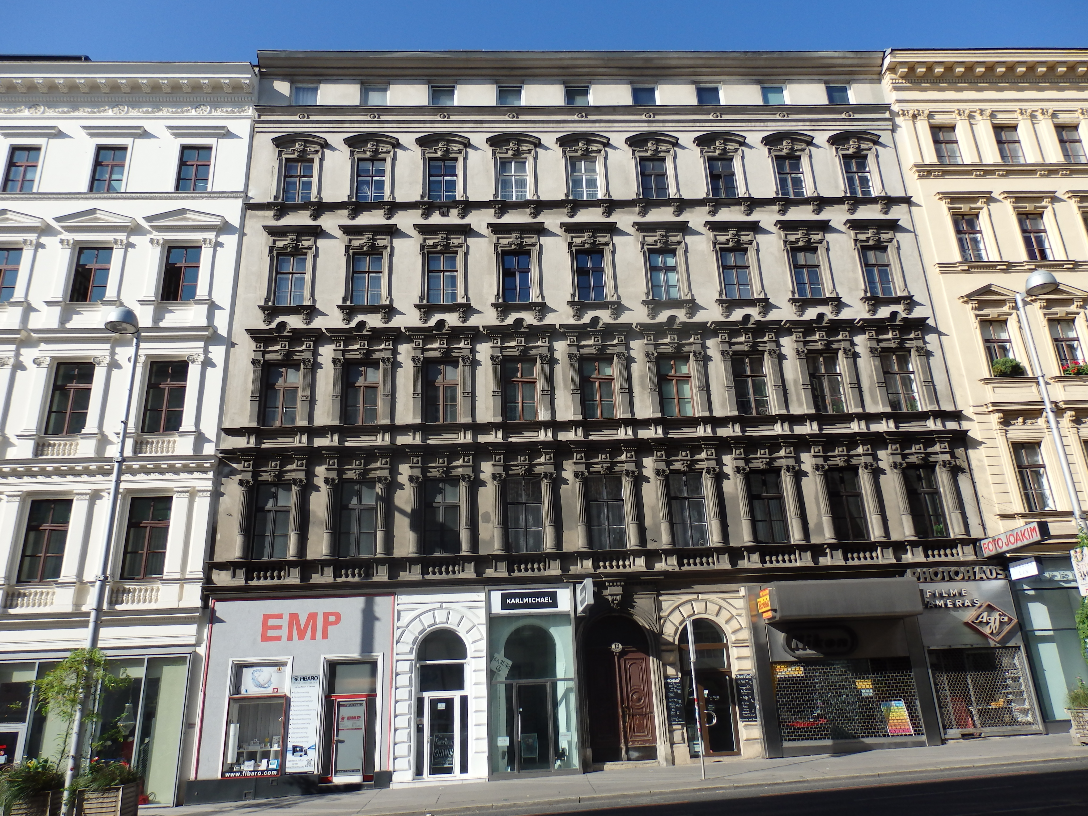 Haus, Getreidemarkt 13, Wien-Mariahilf